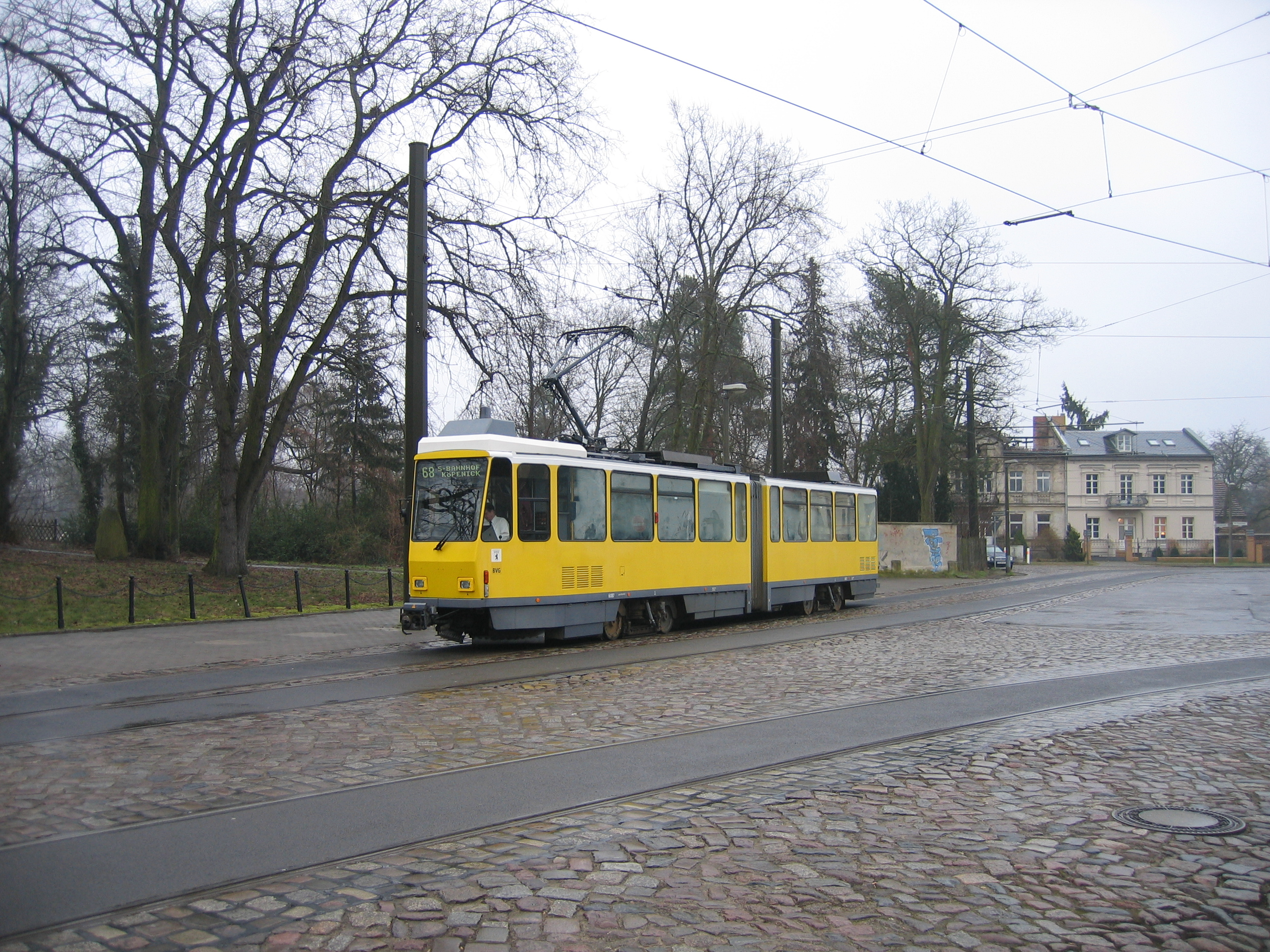 Straßenbahn 68 (Uferbahn) in Berlin-Schmöckwitz